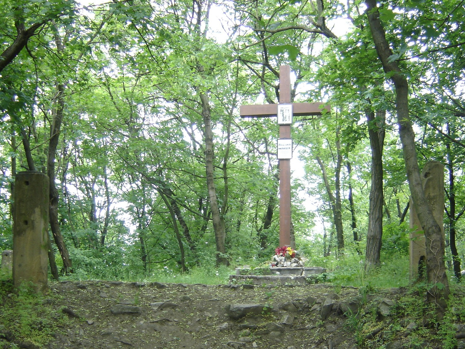 Bratislavská Kalvária